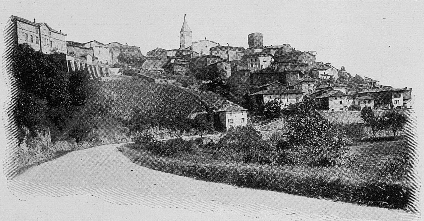 Dictionnaire illustré des communes du département du Rhône. Tome 1 / par MM. E. de Rolland et D. Clouzet.